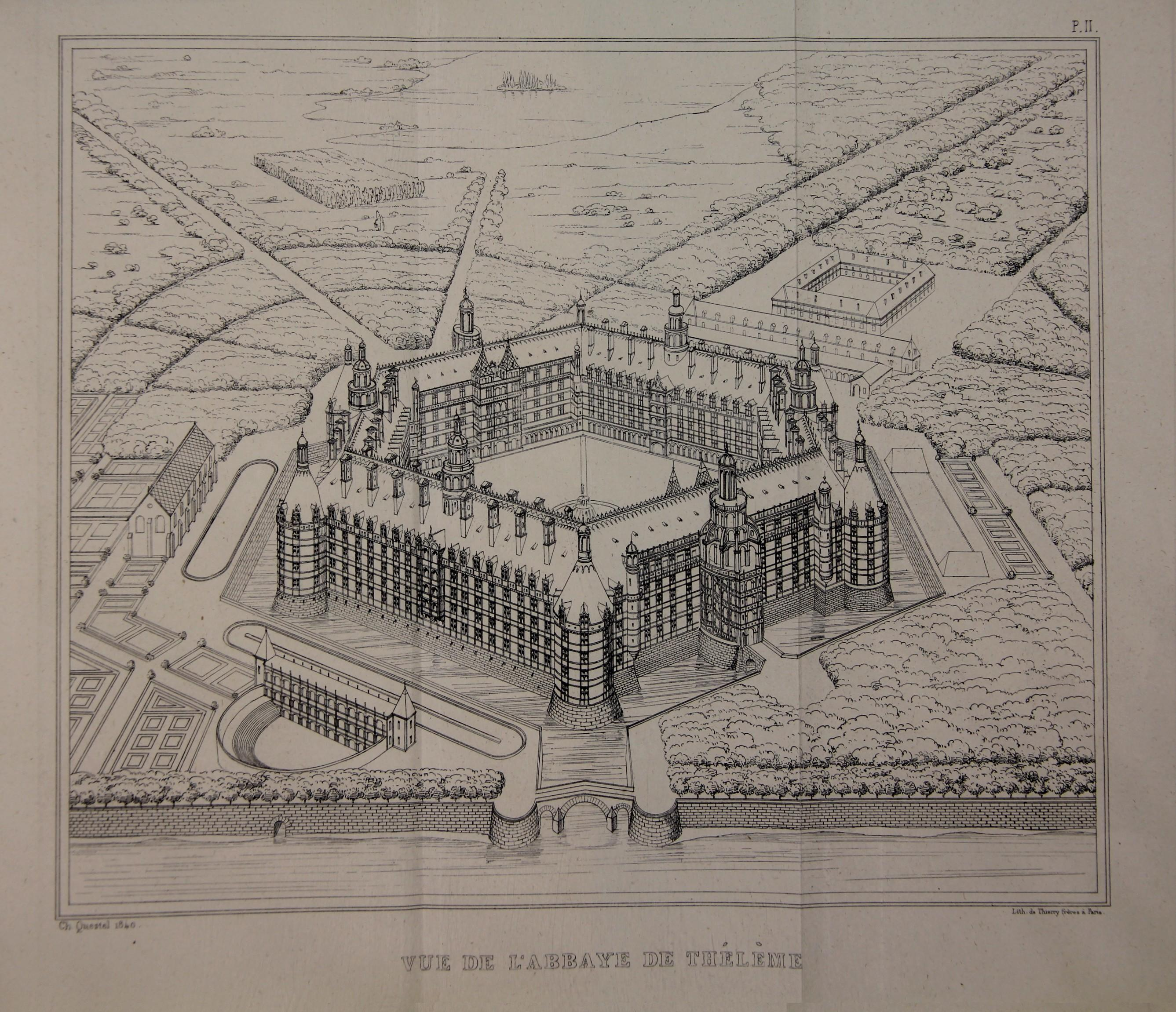 Rabelais et l'architecture de la Renaissance : restitution de l'abbaye de Thélème, par Charles Lenormant, 1840